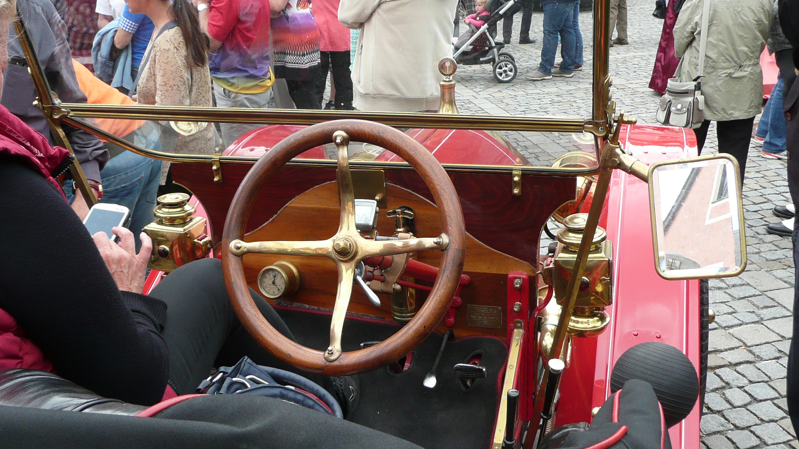 Hupmobile Innenansicht beim Oldtimertreffen 2014 in Höchstadt